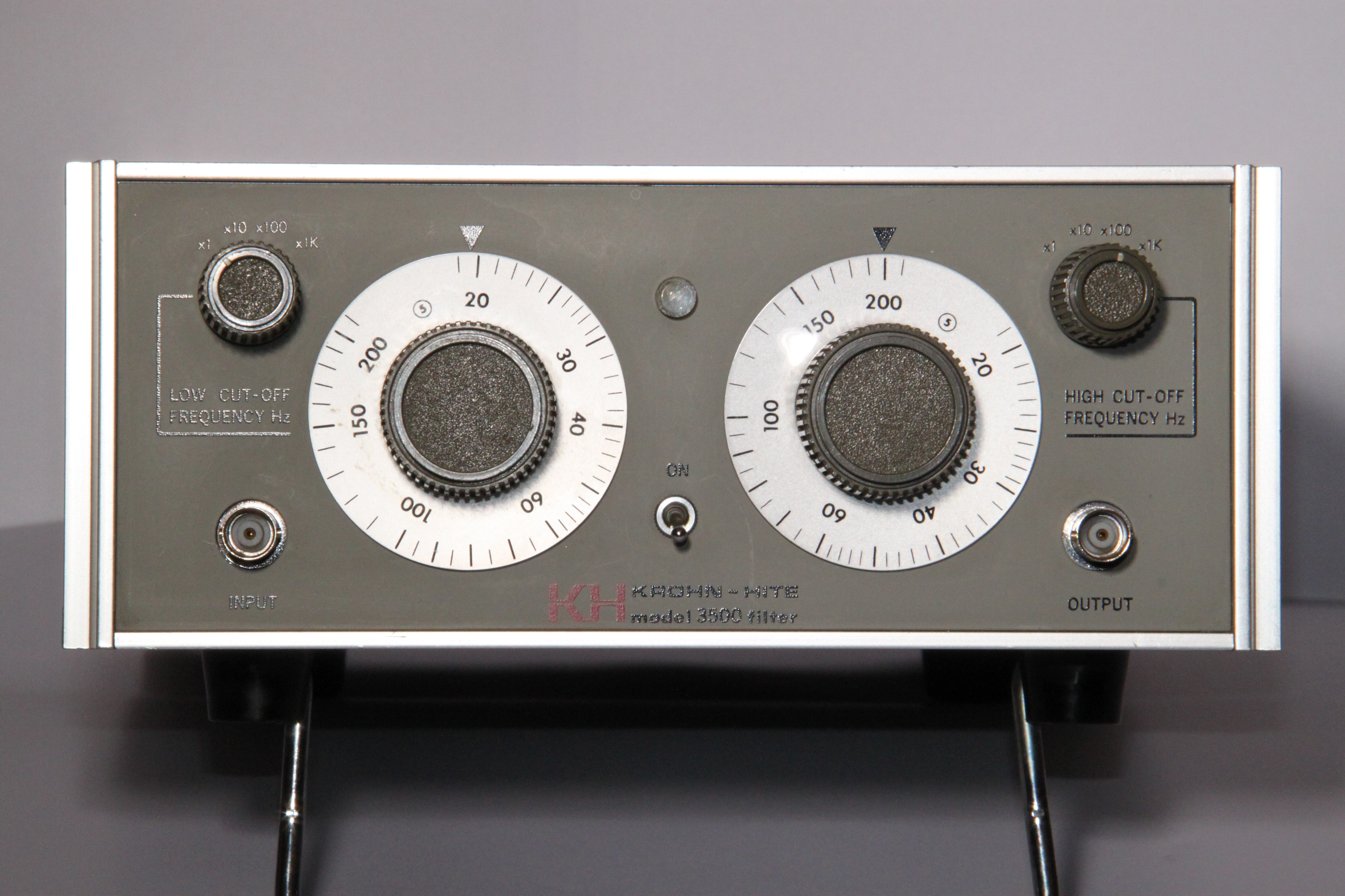 Filtre actif de laboratoire – KROHN-HITE model 3500 filter, 1974.